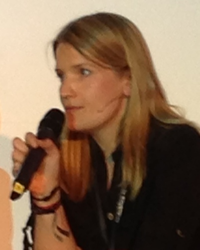 Sonja Schünemann mit dem Projekt ZDFcheck auf der rp13.